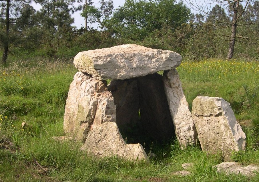 Dolmen en Monte Areo, Asturies